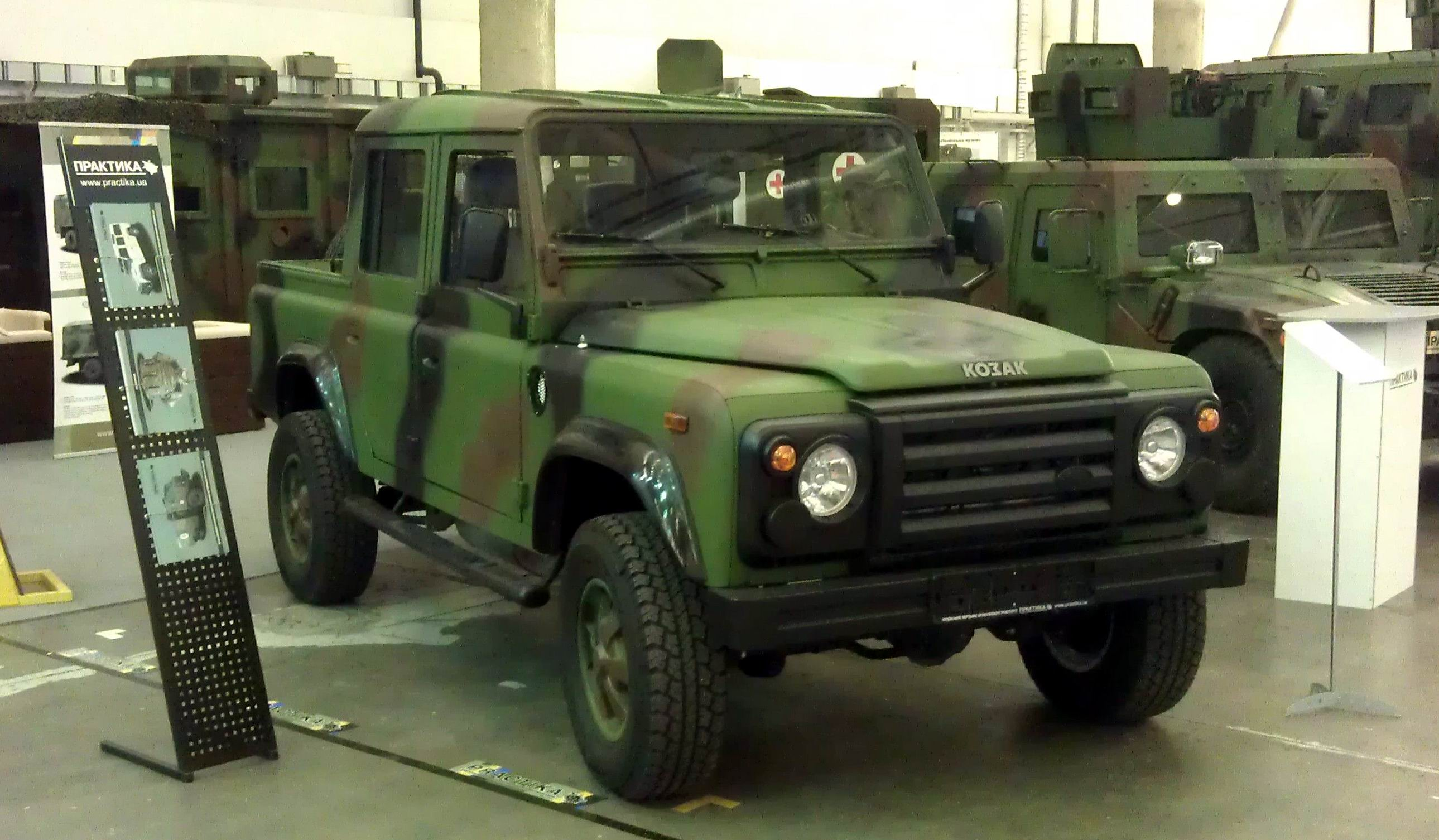 Легкий армейский грузовик "Козак" на стенде НПО "Практика". Лицензионная сборка из машинокомплекта Land Rover Defender 90. Выставка "Зброя та безпека", Киев, сентябрь 2015 г.